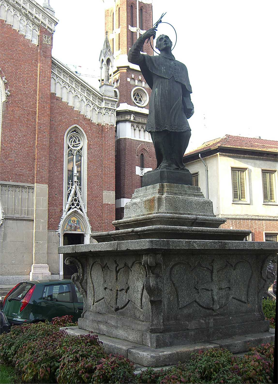 MB Monza monumento a San Carlo Borromeo in piazza Achille Grandi